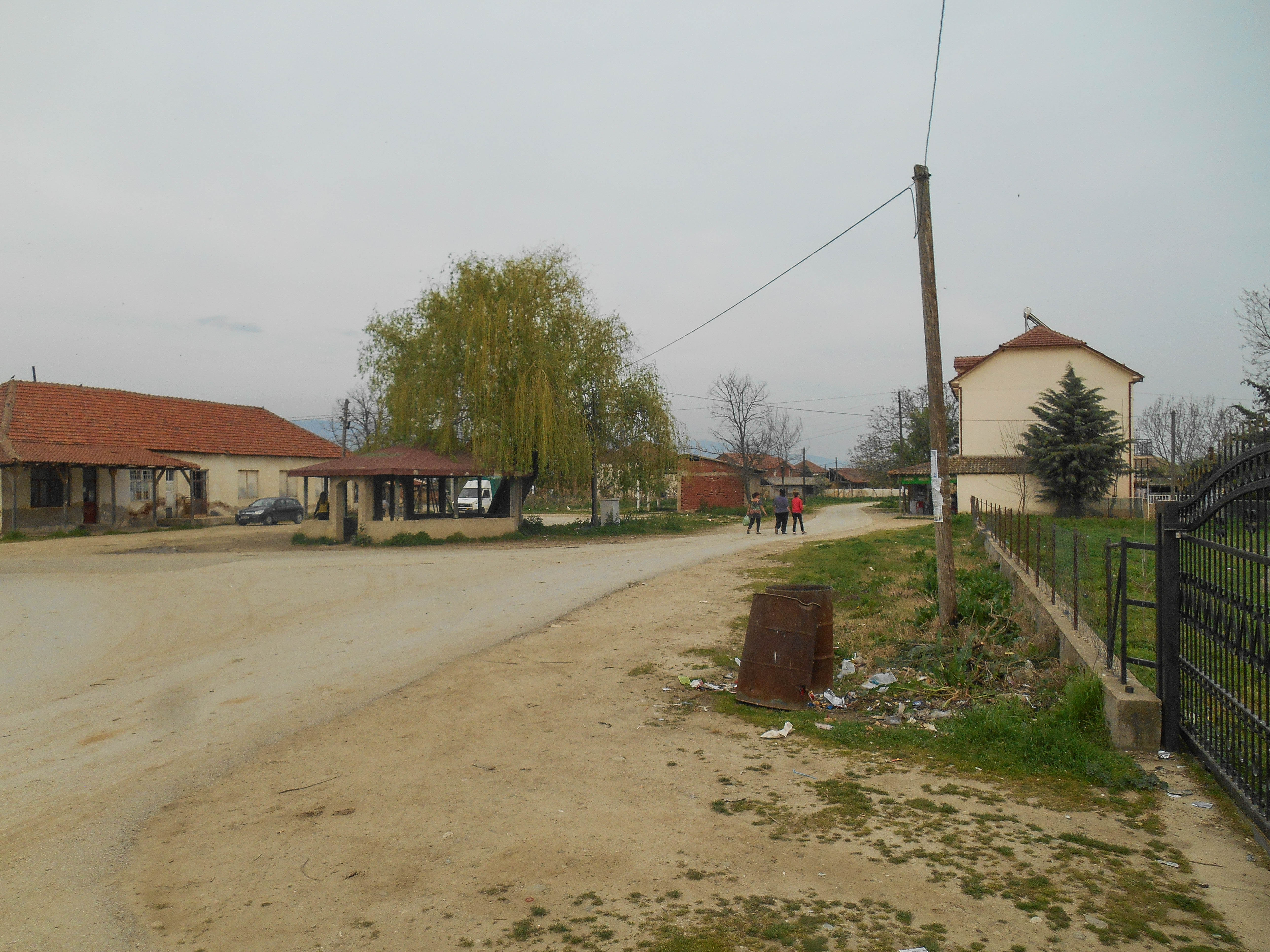 Сачево